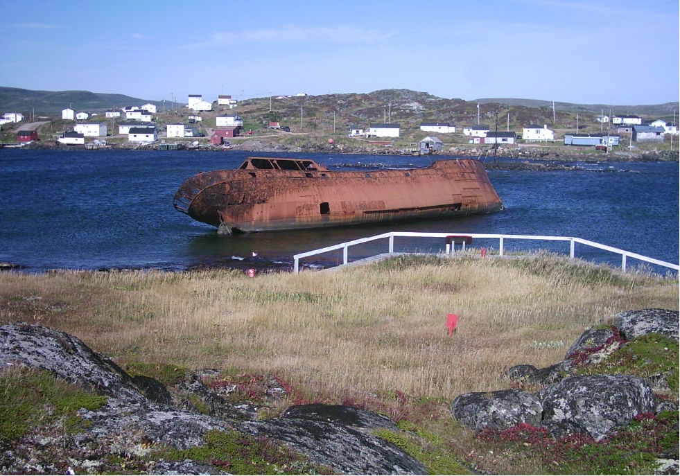 Site archéologique basque à Saddle Island, Red Bay, Labrador, Canada. En ce lieu se trouvait vers 1550 des fours pour faire cuire la graisse de baleines. Il y a deux épaves, dont une sous l'eau, celle du “San Juan” échouée en 1565 et celle du “Bernier” échouée en 1966.